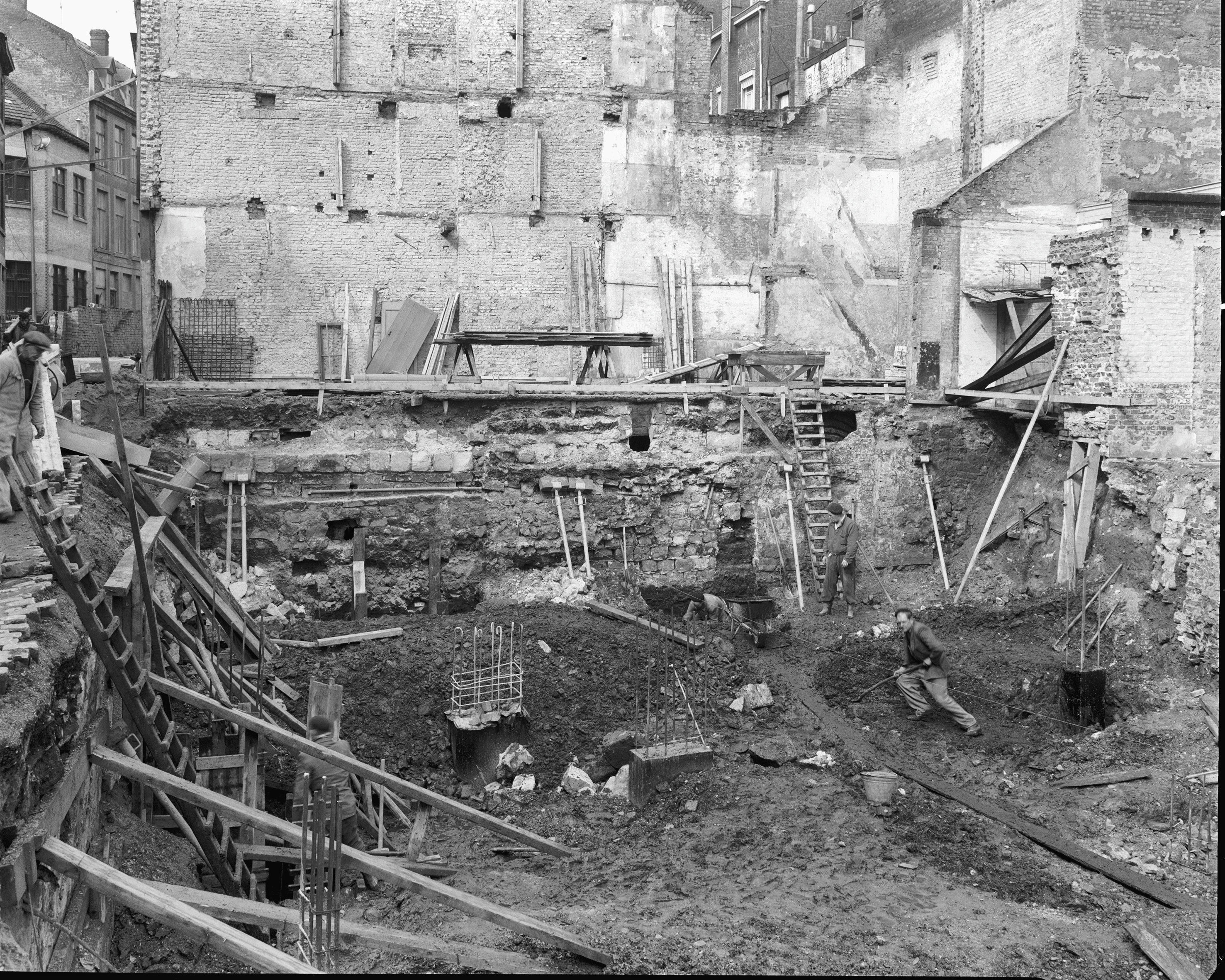 bouwput